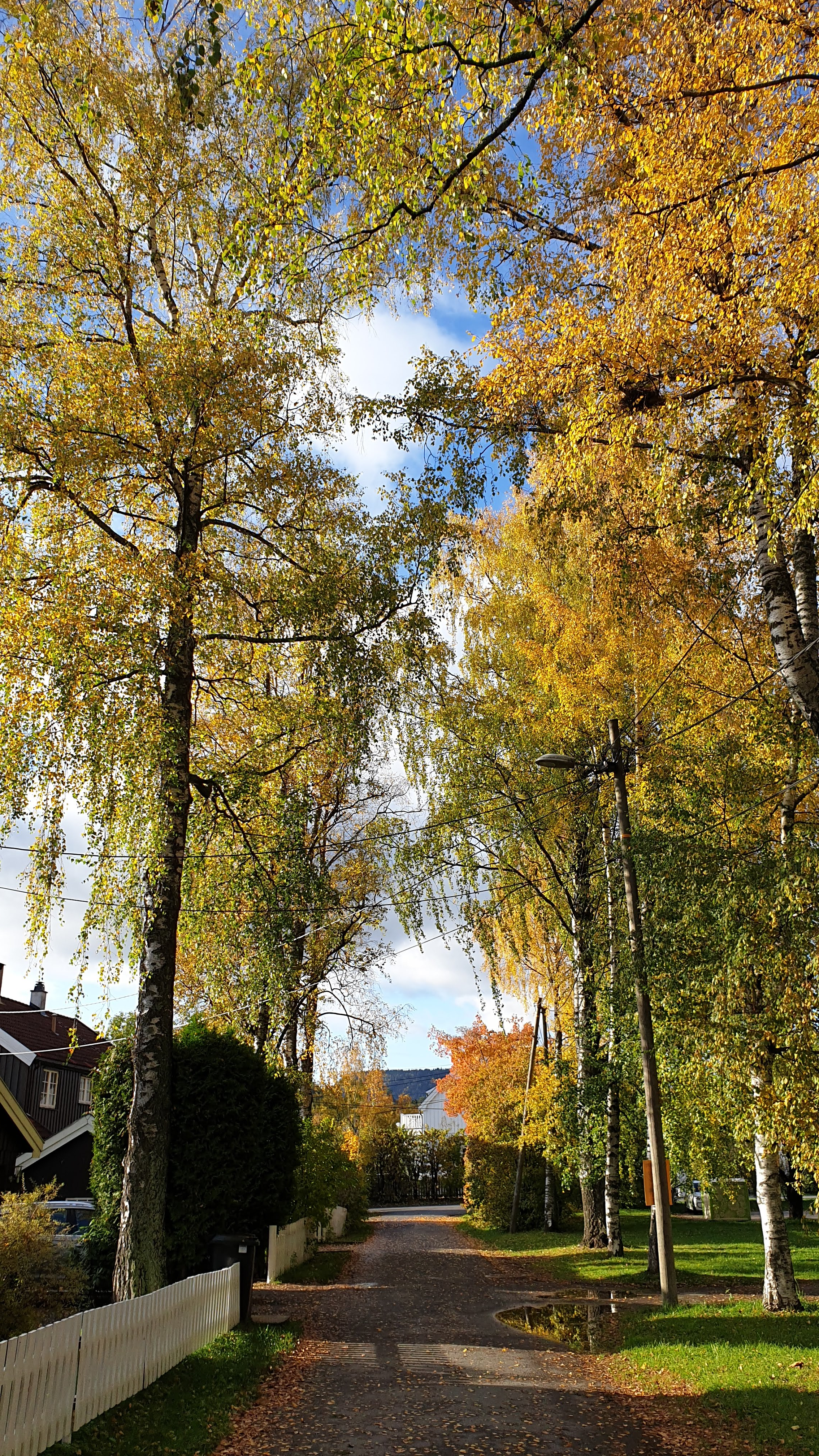 Høst i Presterud allé. Bilde er tatt med utsyn mot vest